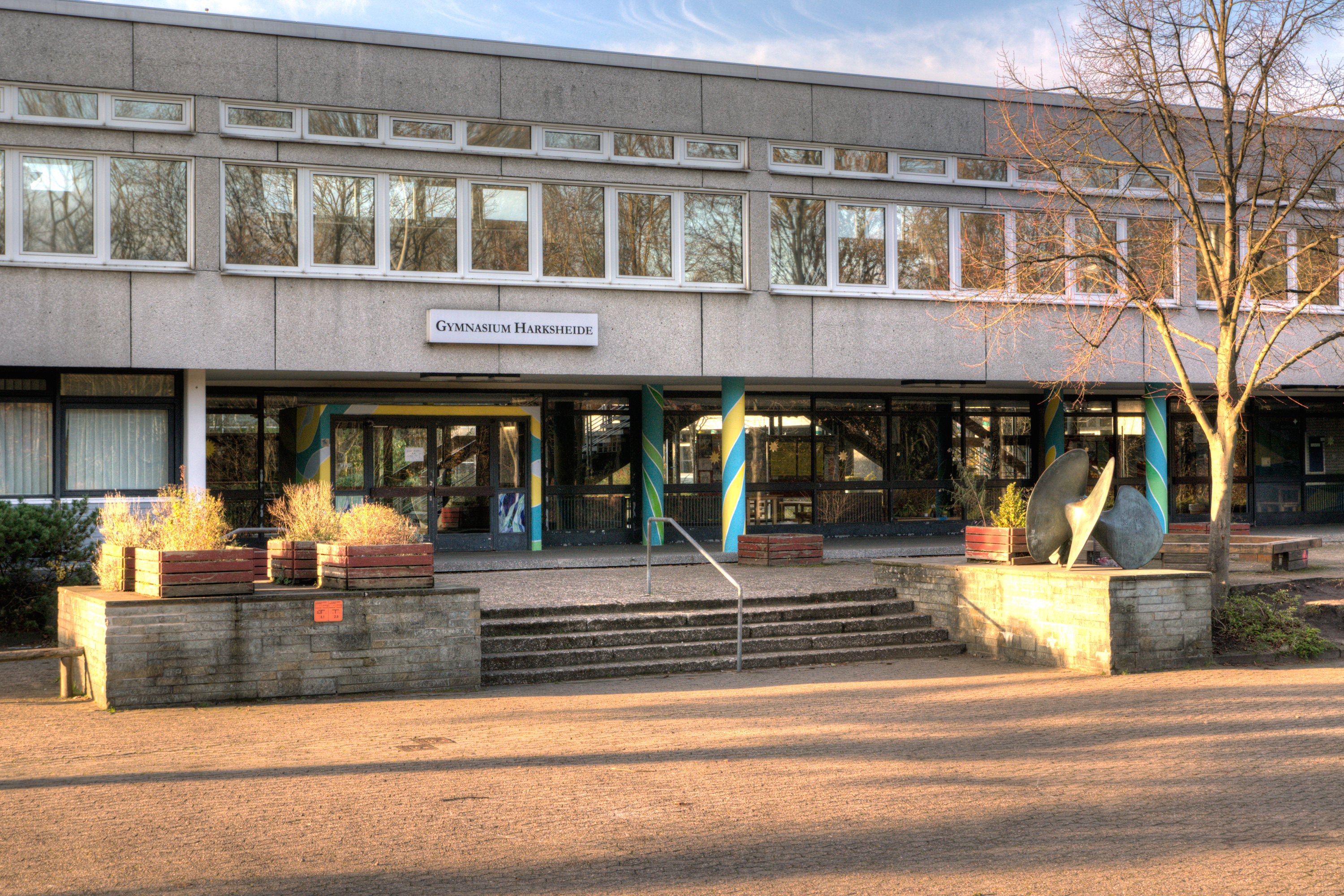 Haupteingang des Gymnasiums Harksheide in Norderstedt. Rechts der Treppe die Bronze "Flügelform" (1970) von Ulrich Beier